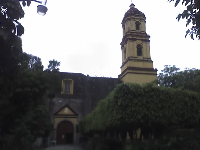 ...Foto de la parroqui del centro de Jiutepec...